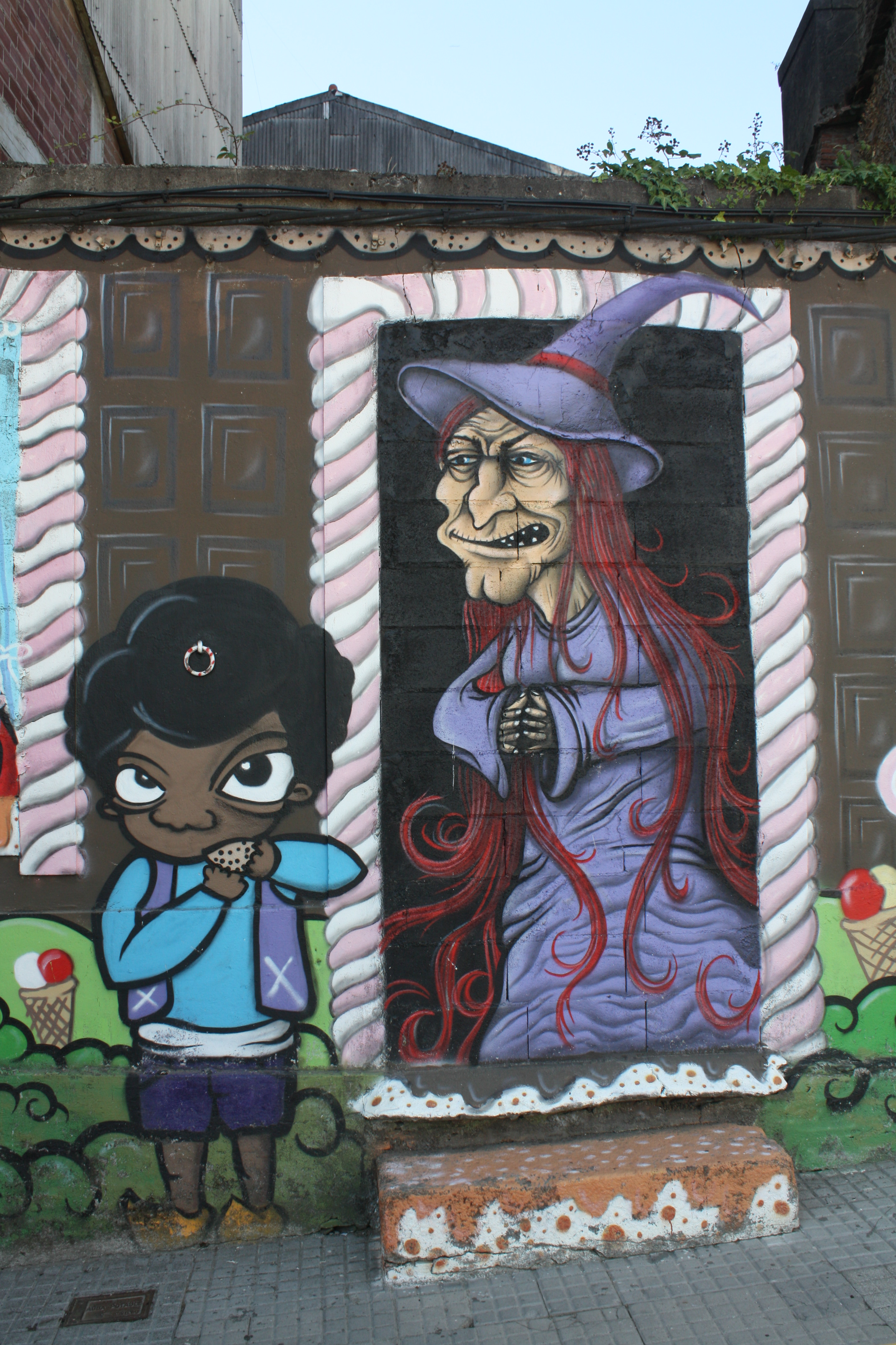 Graffiti en Ordes (A Coruña)